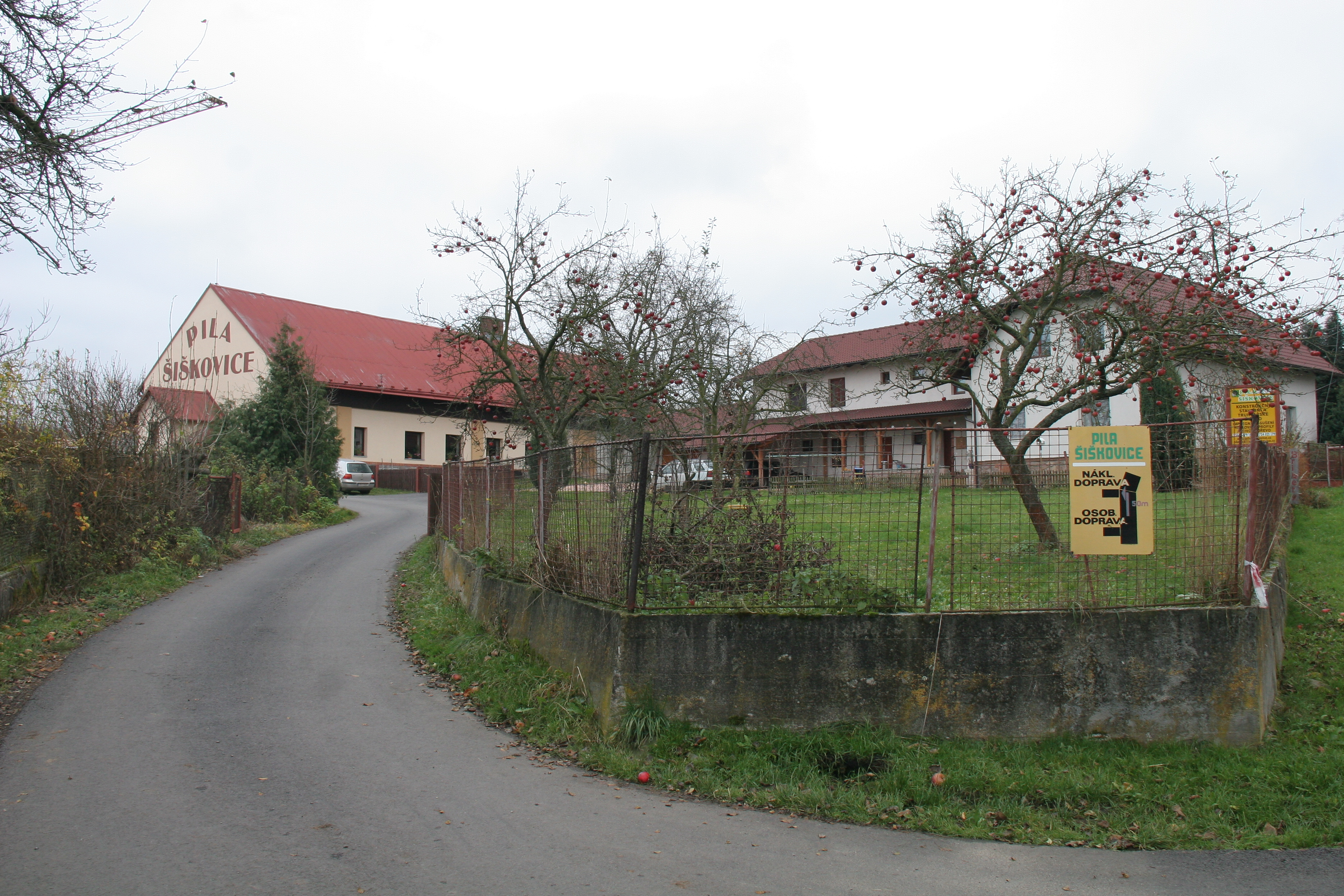 Šiškovice pila